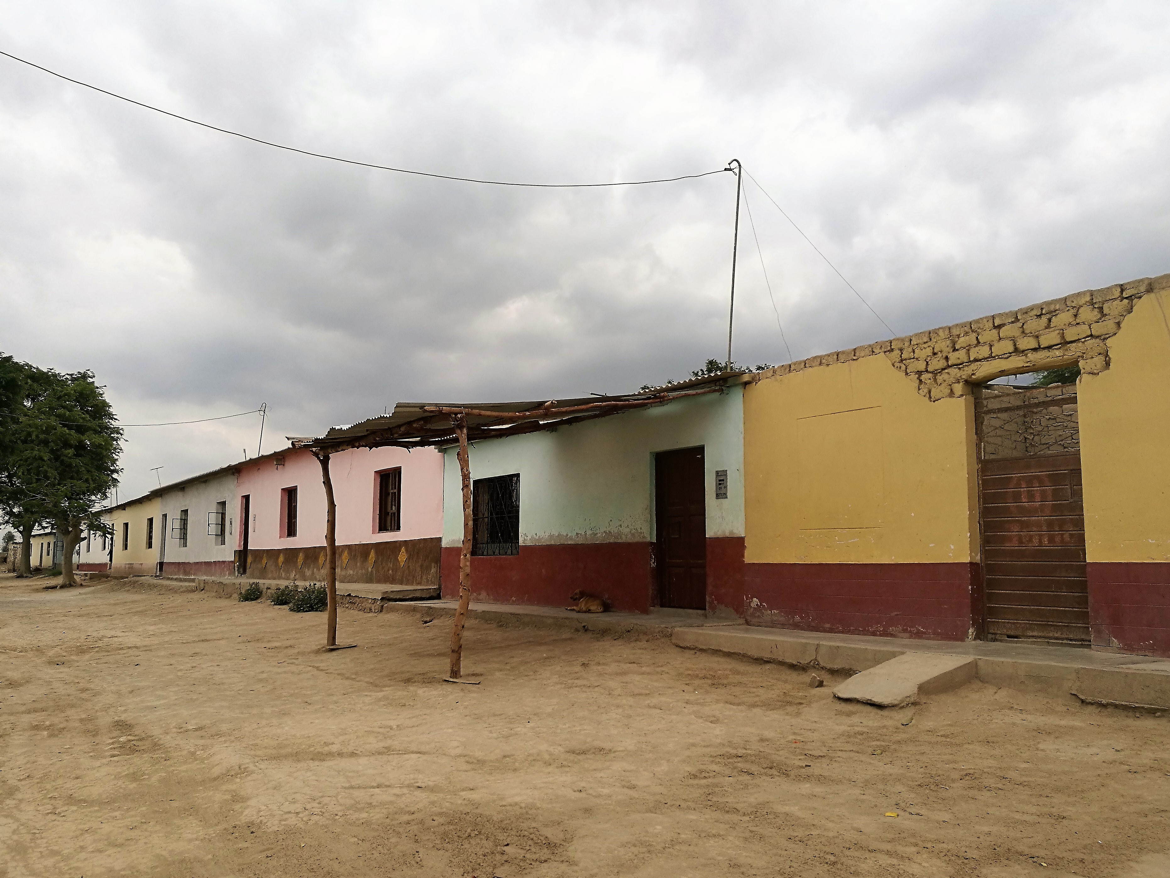 Carrer de Capote, al districte de Picsi